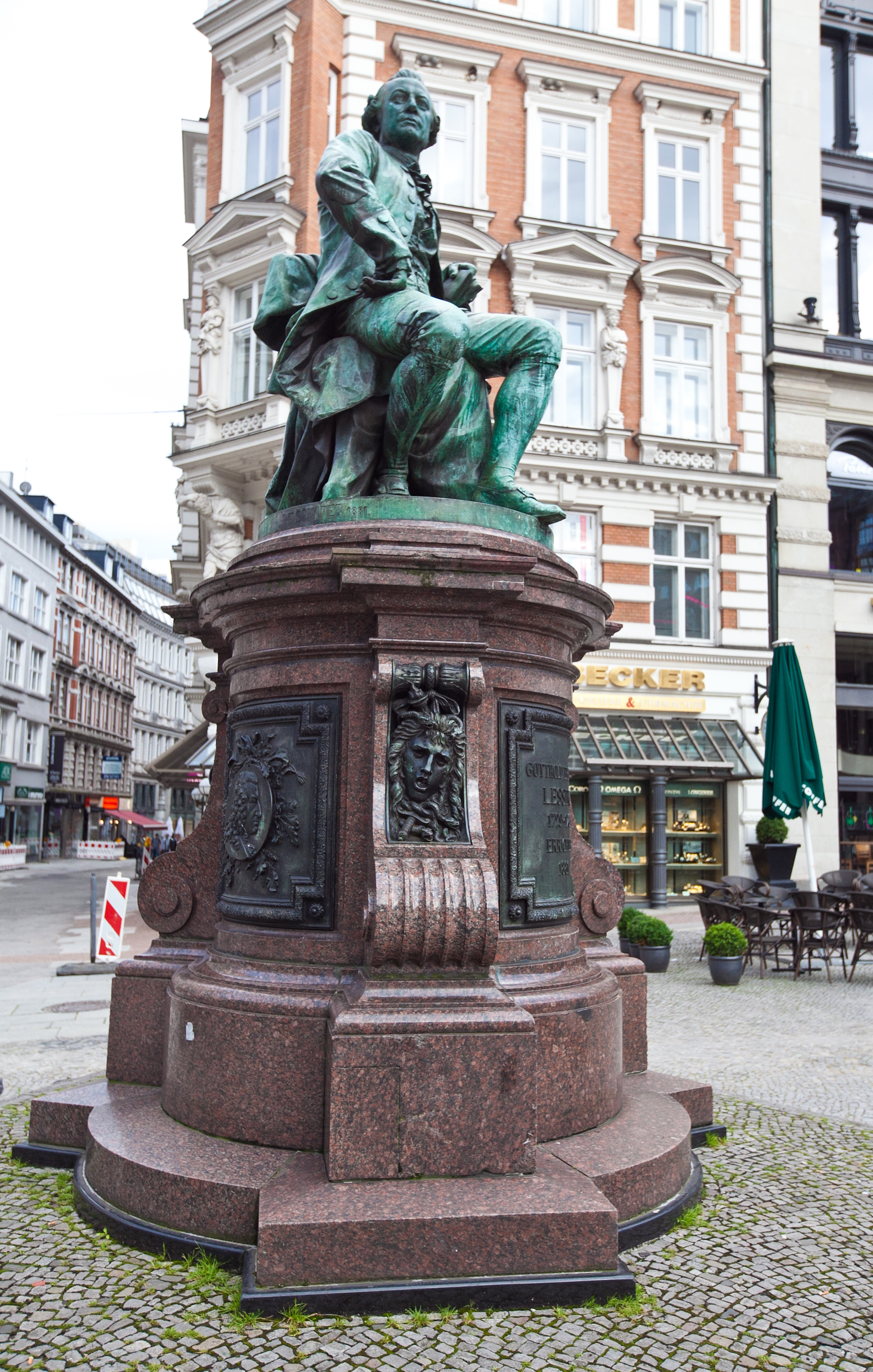 Pomnik Lessinga na Gänsemarkt w Hamburgu z 1881 r. Autor projektu: Fritz Schaper.